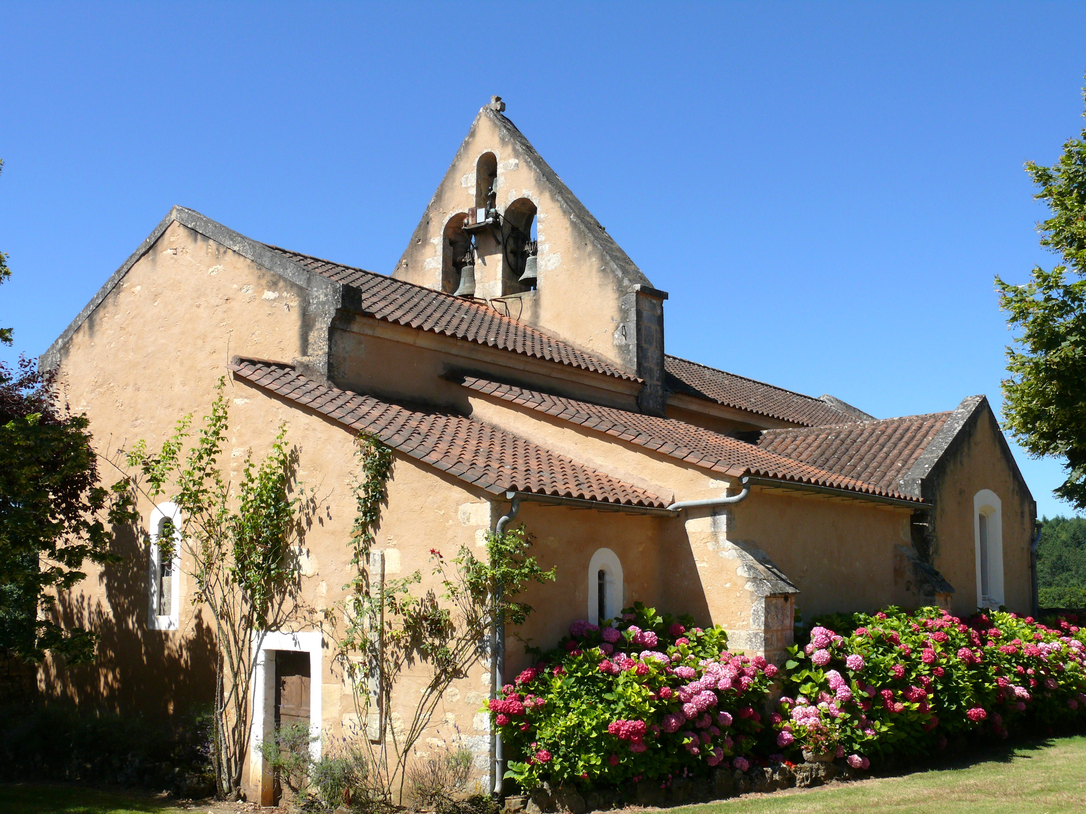 Lavaur (Dordogne)- Eglise Saint-Avit